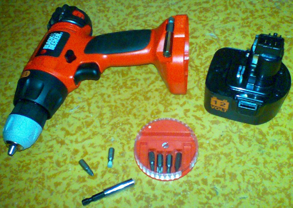 Шуруповерт с битами